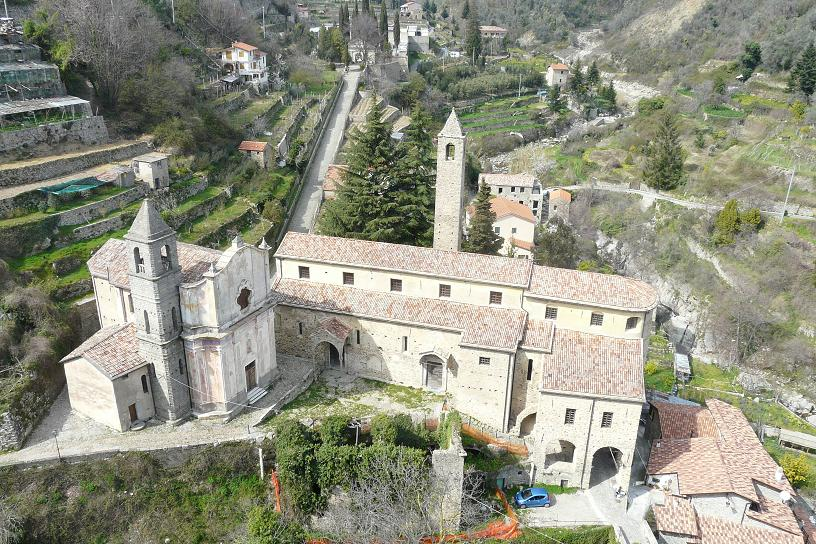 Oratorio di Santa Caterina da Genova e Chiesa di Santo Spirito, Ceriana, Liguria, Italia